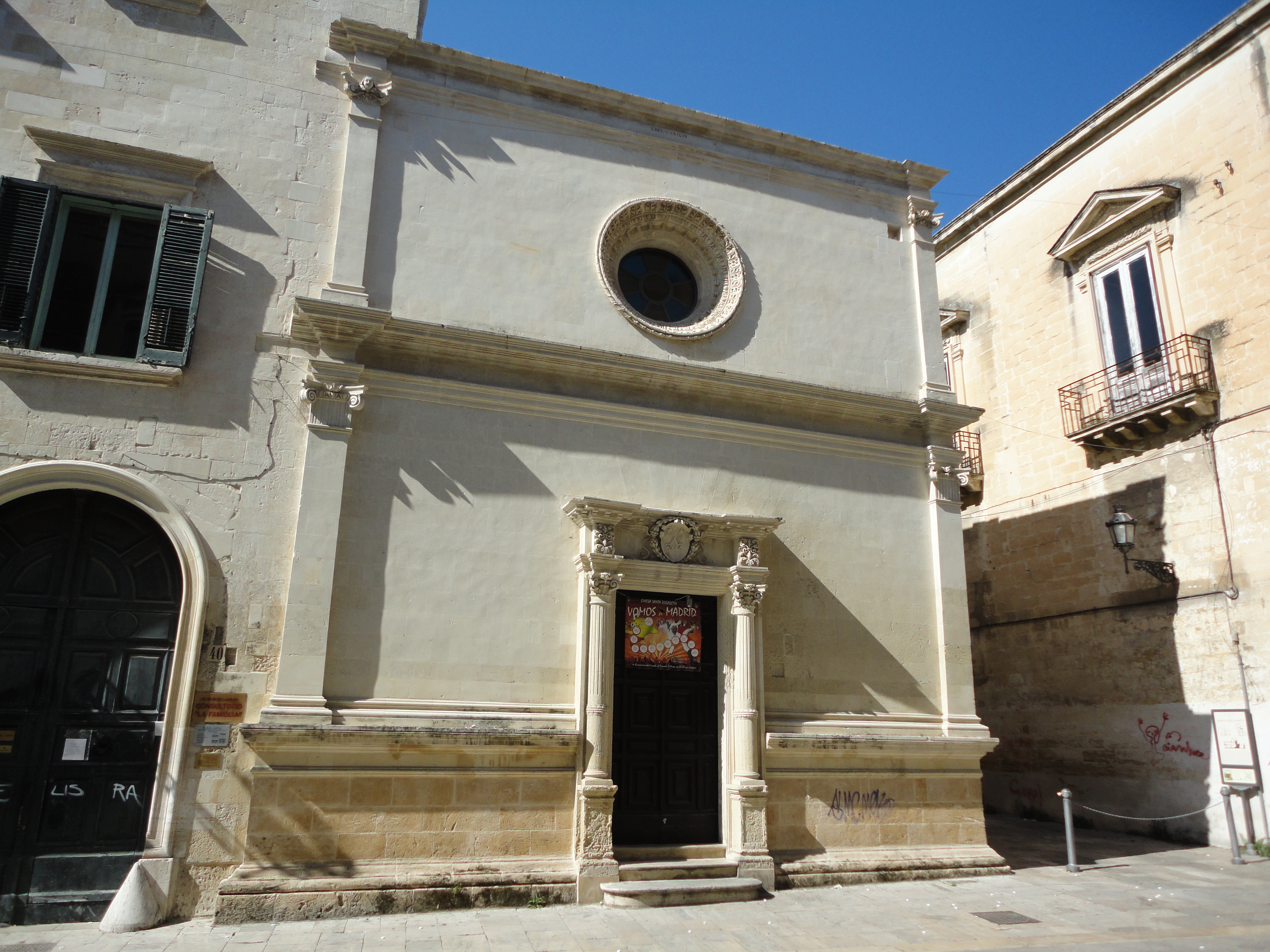 Lecce Chiesa di Santa Elisabetta